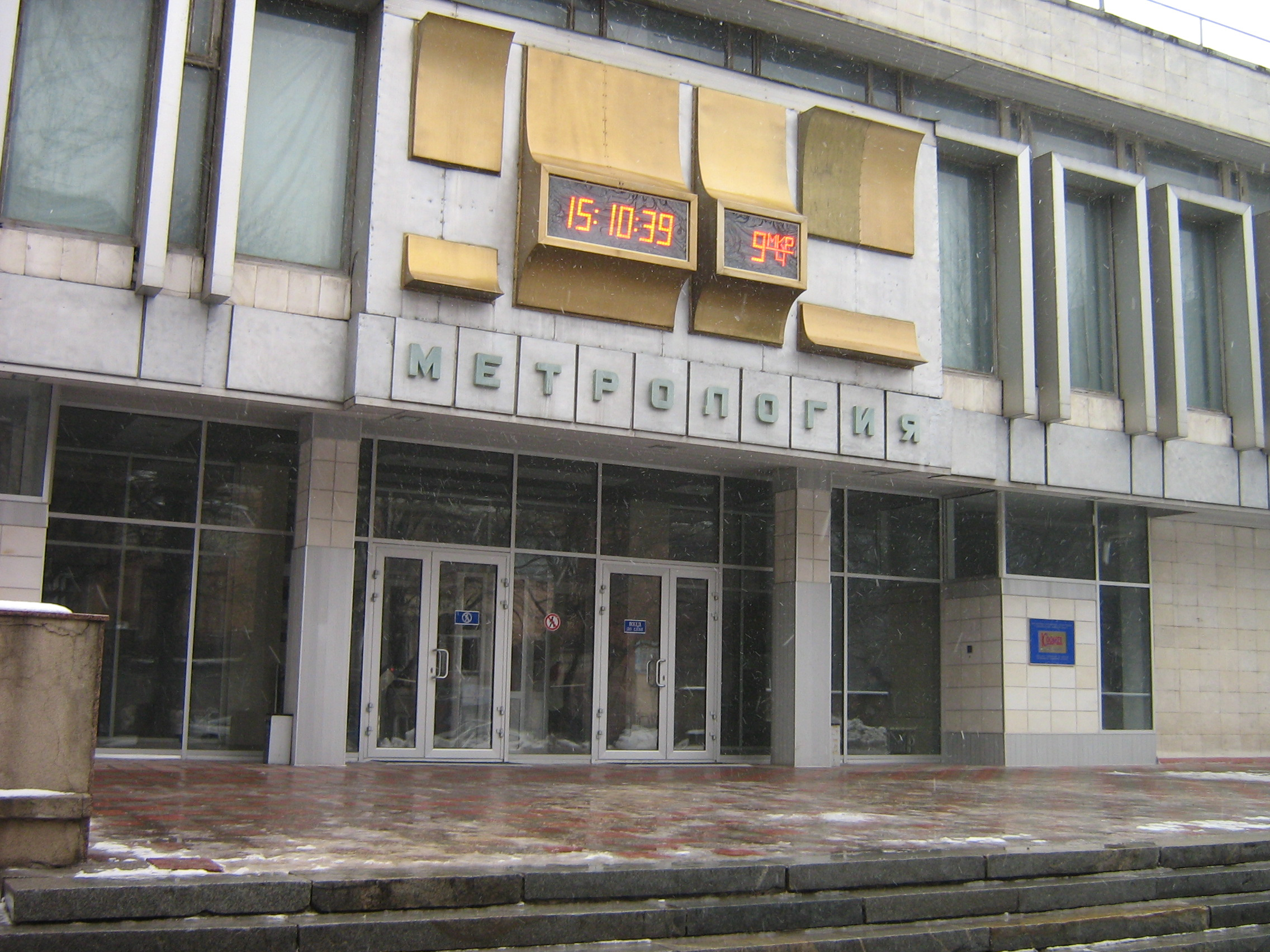 Проходная Национального Научного Центра "Институт метрологии". Харьков. Украина.